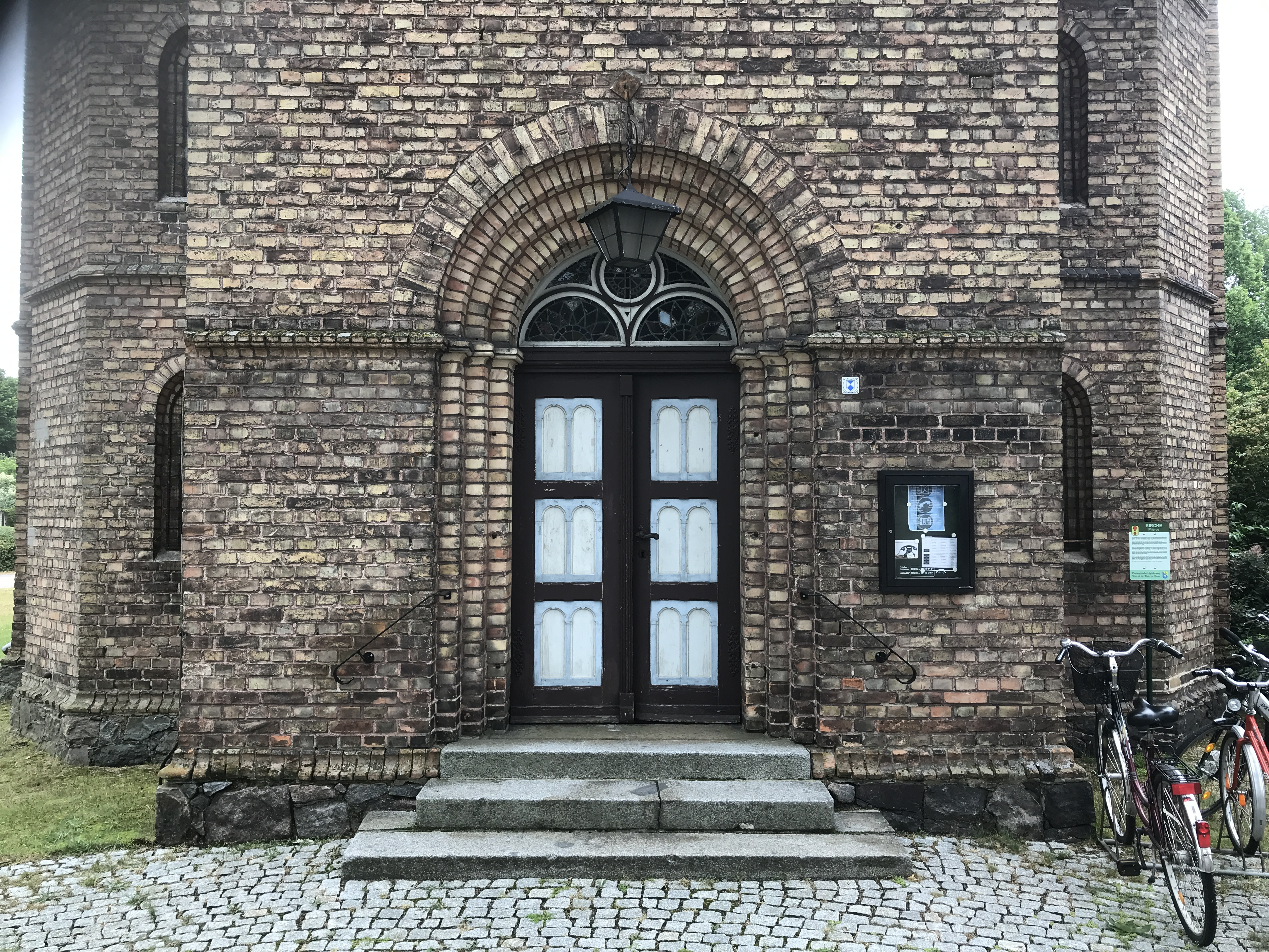 Die Dorfkirche Prieros in Prieros der Gemeinde Heidesee im Landkreis Dahme-Spreewald ist eine neuromanische Backsteinkirche aus dem Jahren 1873 bis 1875. Im Innern steht unter anderem ein Ädikula-Altar aus der zweiten Hälfte des 17. Jahrhunderts.